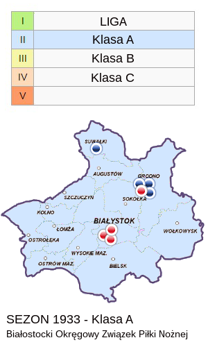 Jagiellonia w sezonie 1933 - mapa